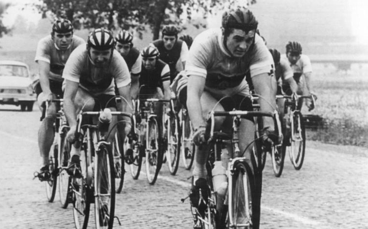 Ampler, Hoffmann, Mickein, Eckstein, Vogelsang, Marks Zentralbild Gahlbeck 10.7.1966 Straßenrennen um den Großen Sachsenpreis Karl-Marx-Stadt - Dresden - Leipzig - Karl-Mars-Stadt Die gesamte Sprtzenklasse der DDR nahm an dem mit 265 km längstem Straßenrennen der DDR am 10.7.1966 um den Großen Sachsenpreis teil R. Marks (recht) wurde Zweiter hinter Dippold. vlnr: Ampler, Hoffmann, Mickein, Eckstein, Vogelsang und Marks.